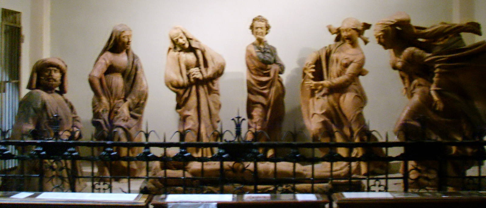 Niccolò dell'arca, Compianto sul Cristo morto, Chiesa di S. Maria della vita, Bologna